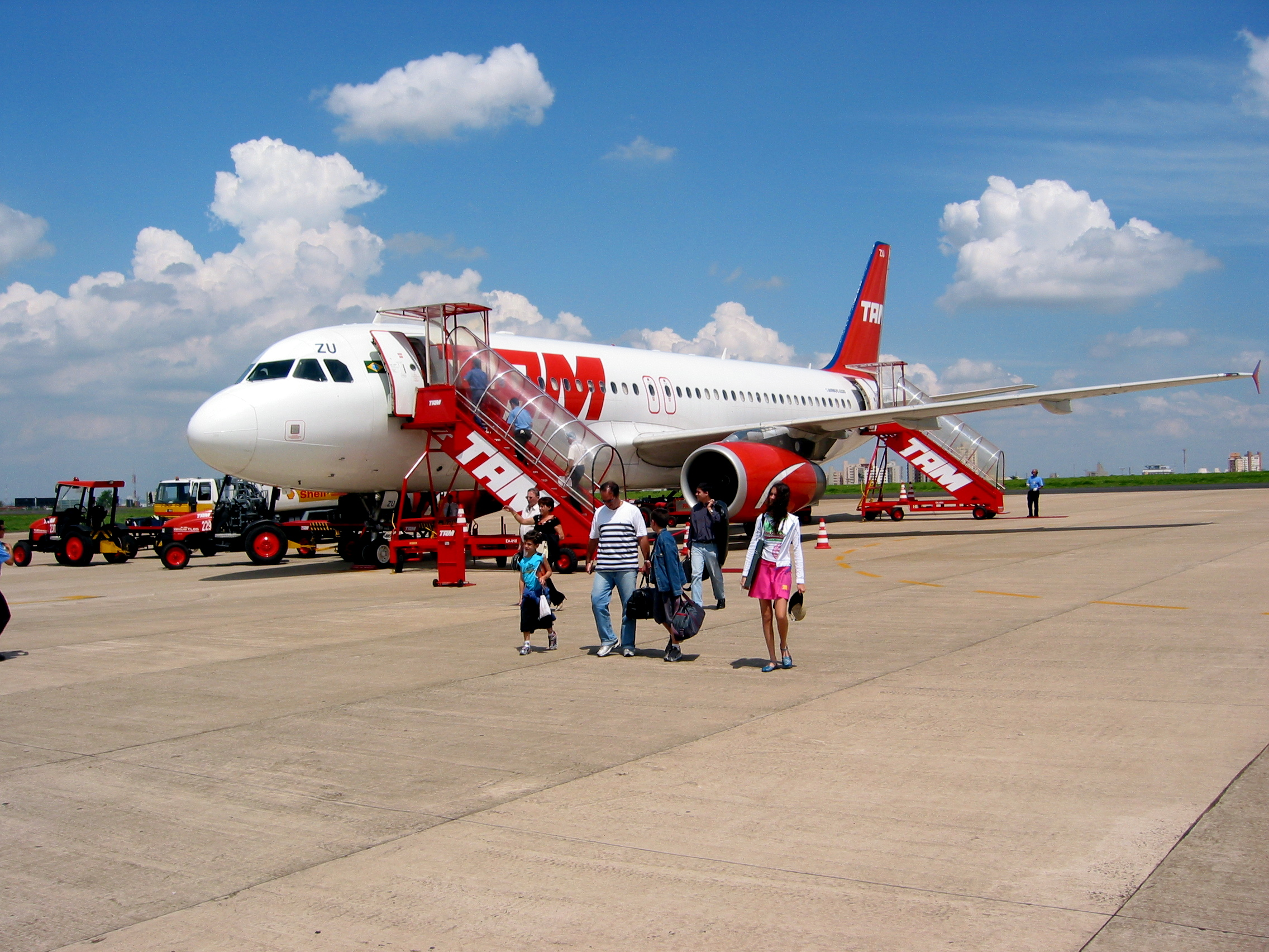 TAM Airbus A320 (PT-MZU) at São José do Rio Preto, São Paulo, Brazil